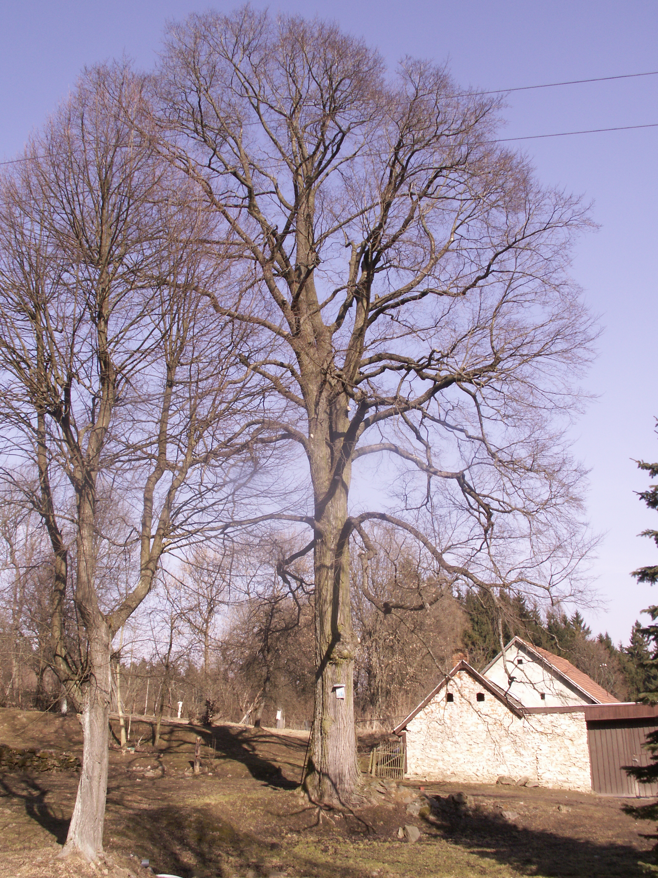 jilm drsný (Ulmus glabra Huds.), památný strom, výška 25 m, obvod 330 cm, Starý Telečkov, okres Žďár nad Sázavou, kraj Vysočina